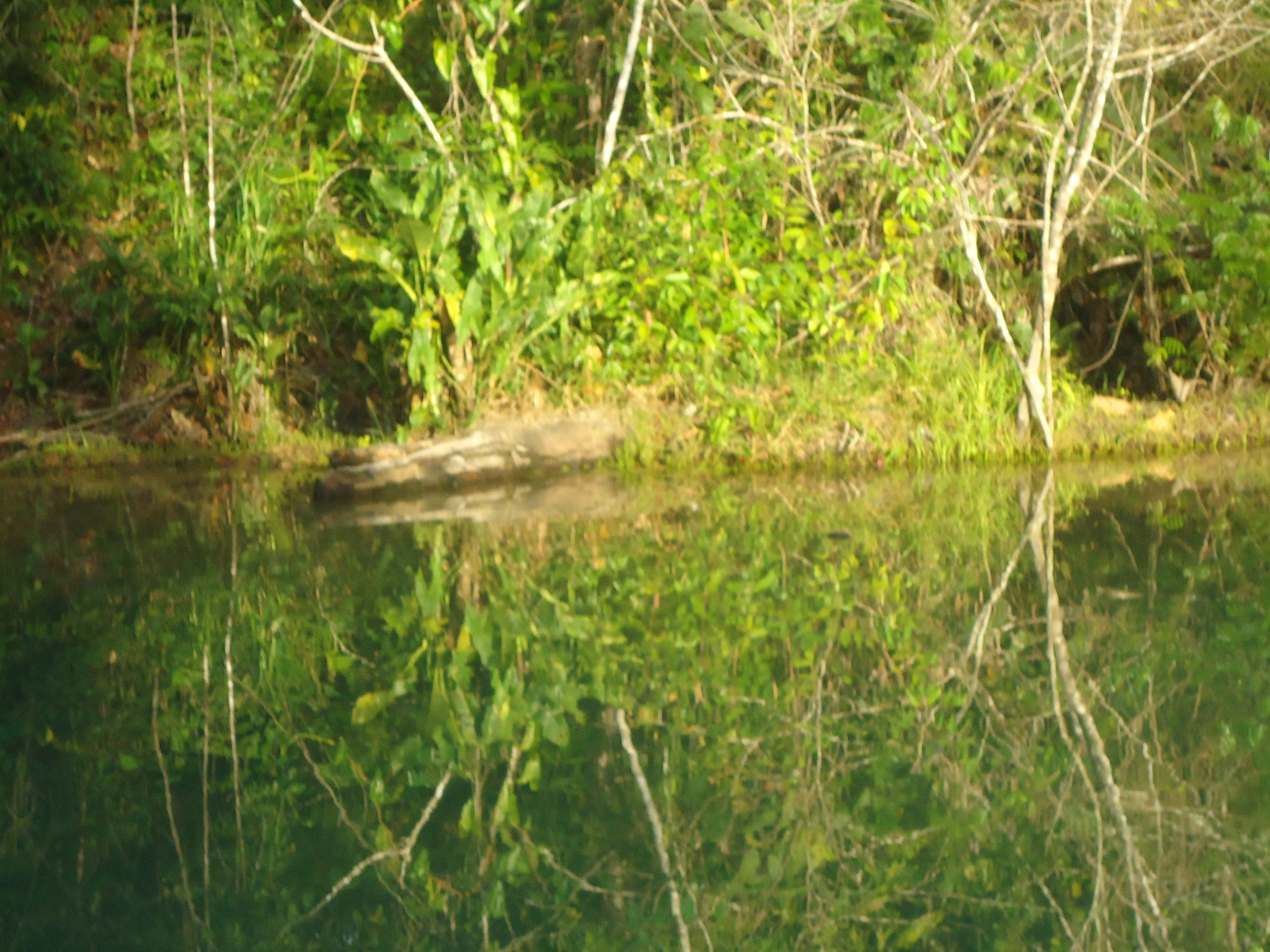 Os igarapés em Marapanim no Estado do Pará são belezas intocadas que ficam ocultas de muitos,eu tive o privilégio de fotografar e nadar em águas puras.